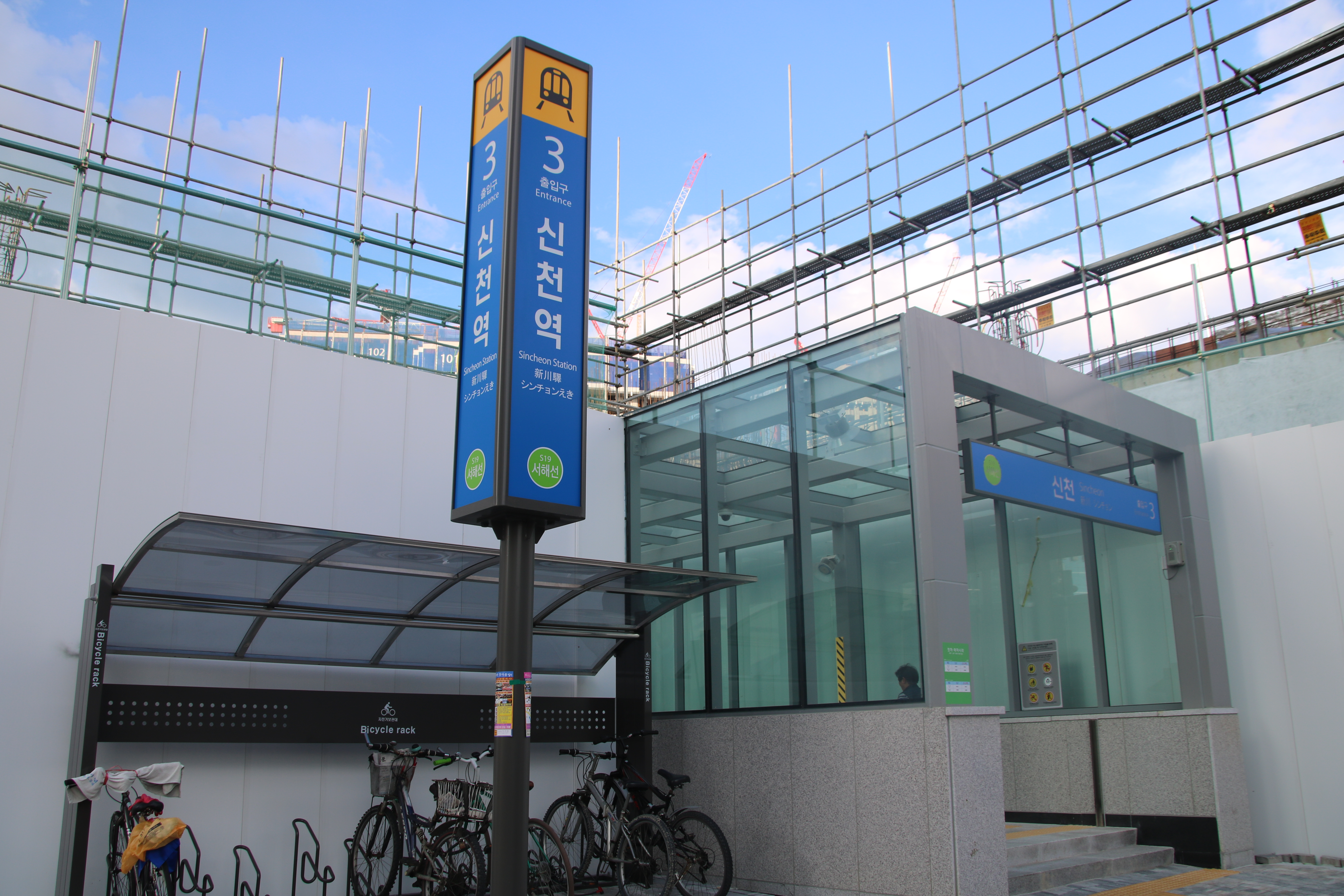 서해선 신천역 3번 출입구